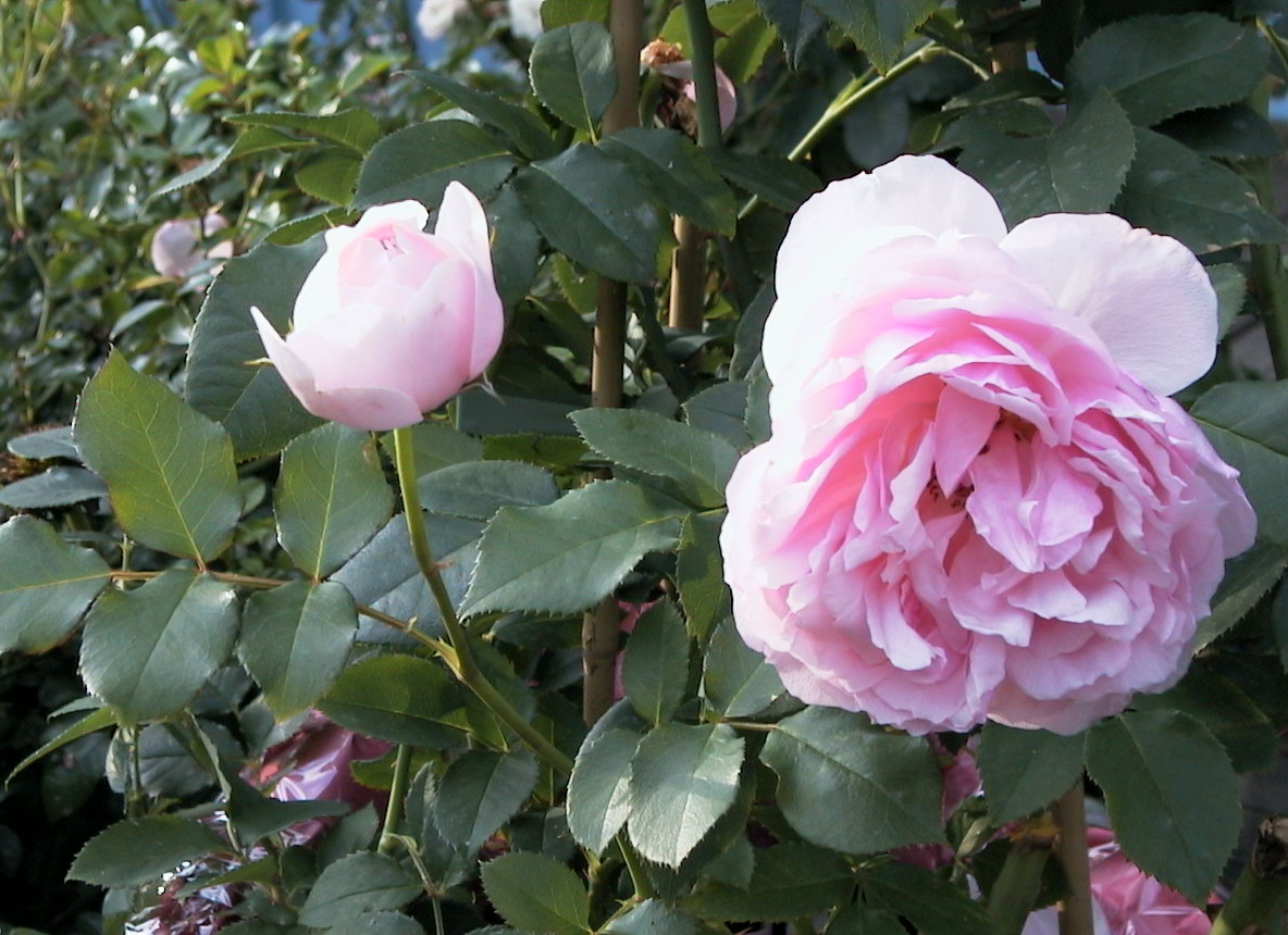 Rosa 'Eckart Witzigmann', Delbard 2003